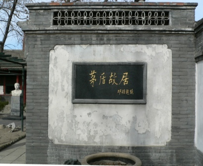 茅盾故居影壁 拍摄